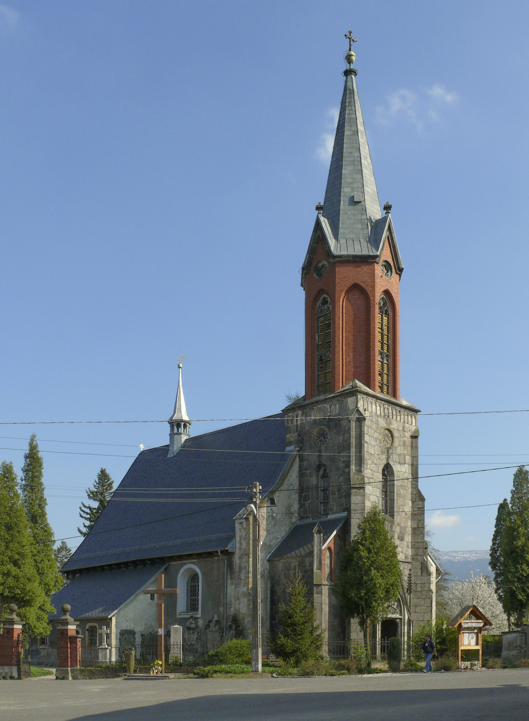 Miłków, ul. Wiejska - kościół parafialny p.w. św. Jadwigi (zabytek nr A/765/1414)